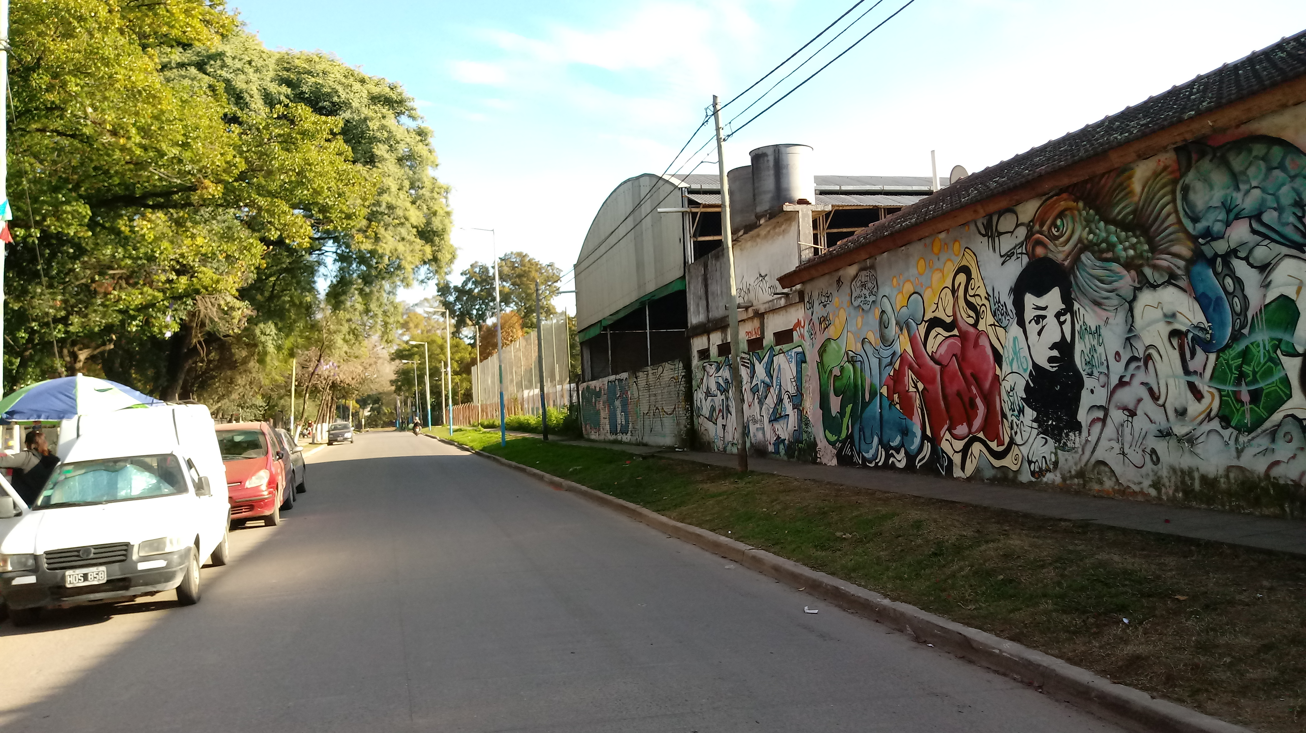 Arte Urbano en el Gran Buenos Aires, Argentina.